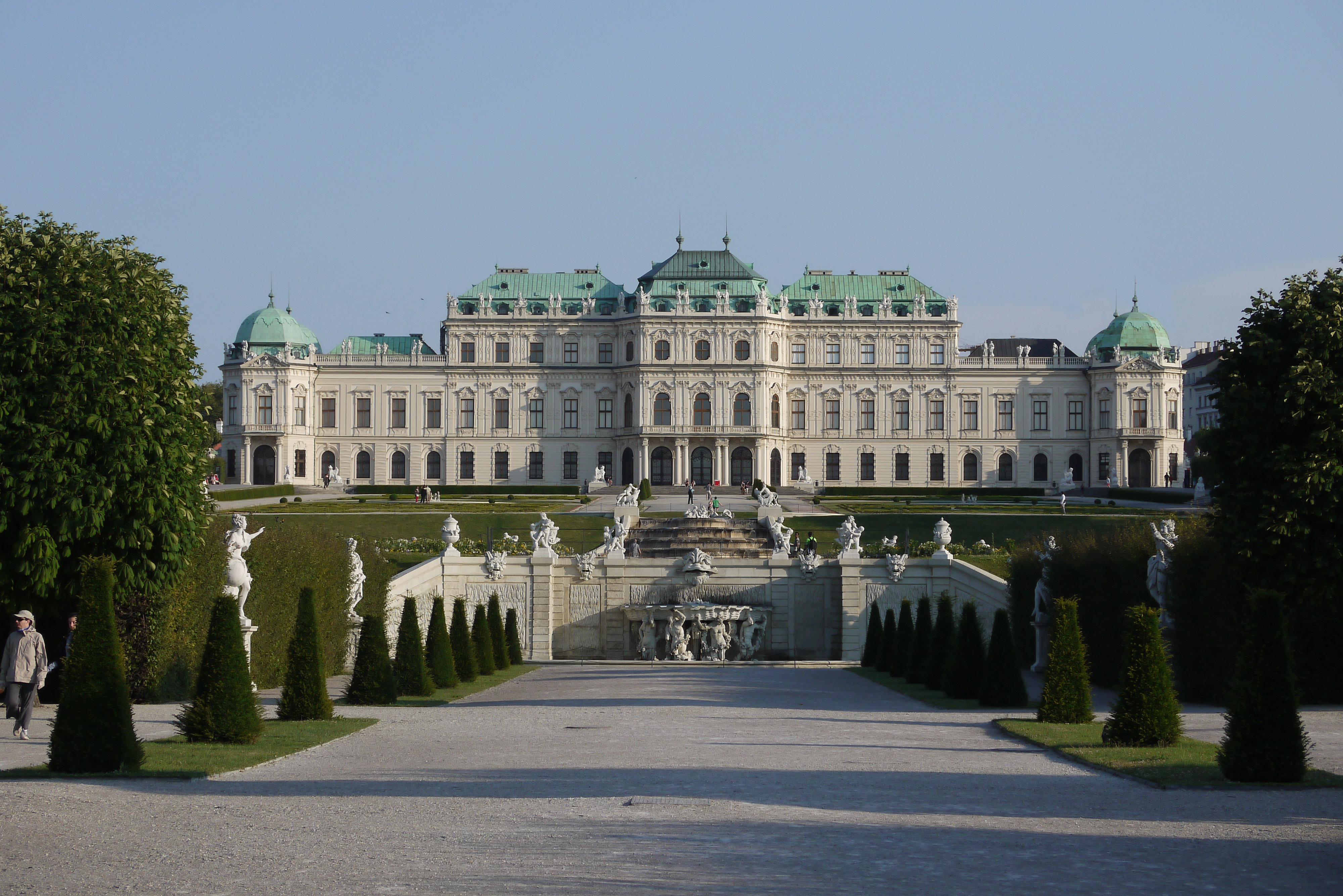 Schloss Belvedere samt Schlosspark mit Baulichkeiten